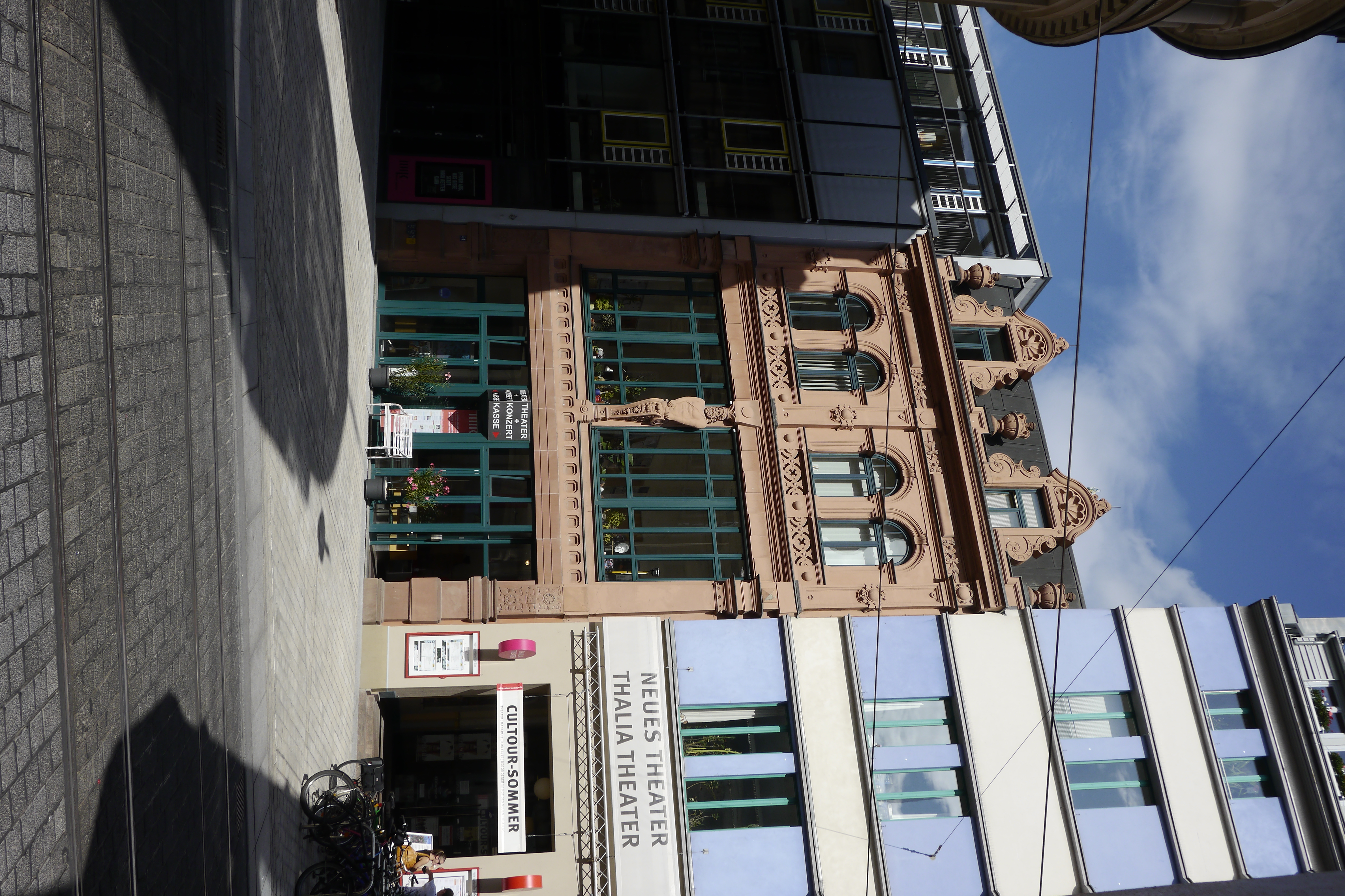 Neues Theater - Thaila Theater - Große Ulrichstraße - Altstadt Halle (Saale)